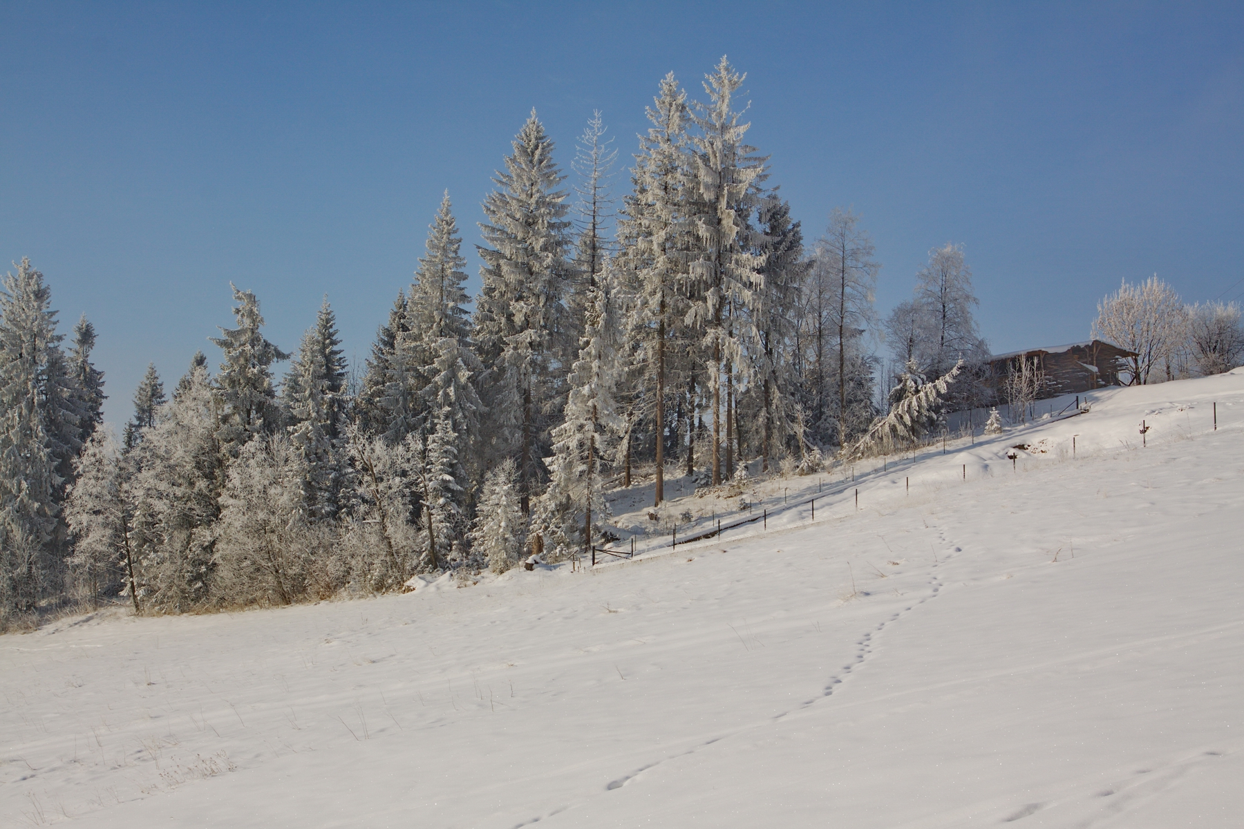 Widok z Wierchu Olczańskiego